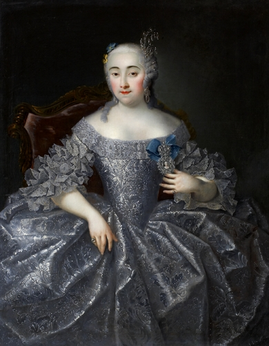 Портрет графини Варвары Алексеевны Шереметьевой Государственная Третьяковская галерея,Москва Княжна Варвара Алексеевна Черкасская (11.09.1711–2.10.1767), единственная дочь канцлера Алексея Михайловича Черкасского и его второй жены Марии Юрьевны, урожденной княжны Трубецкой. "Самая богатая невеста России". С 1741 г. Варвара Алексеевна — фрейлина при Анне Иоанновне и первая в России камер–фрейлина (25.04.1742) при Елизавете Петровне, с 1743 г. — статс–дама при Екатерине II. С 1743 г. супруга Петра Борисовича Шереметева. Выгодный брак сделал Шереметева самым богатым помещиком России. Его имения раскинулись по 17 губерниям и включали в себя 130 сел, 1066 больших деревень, 26 слобод, 464 хутора и пустых участка. В приданое Варвары Алексеевны входили усадьбы в Останкине, Марьине и живописная местность Марьина Роща. В распоряжении графа находились собственные живописцы, архитекторы, мраморщики, лепщики, резчики, оконщики, столяры и др. Дети: Анна, Борис–Порфирий, Алексей, Мария, Варвара, Николай.